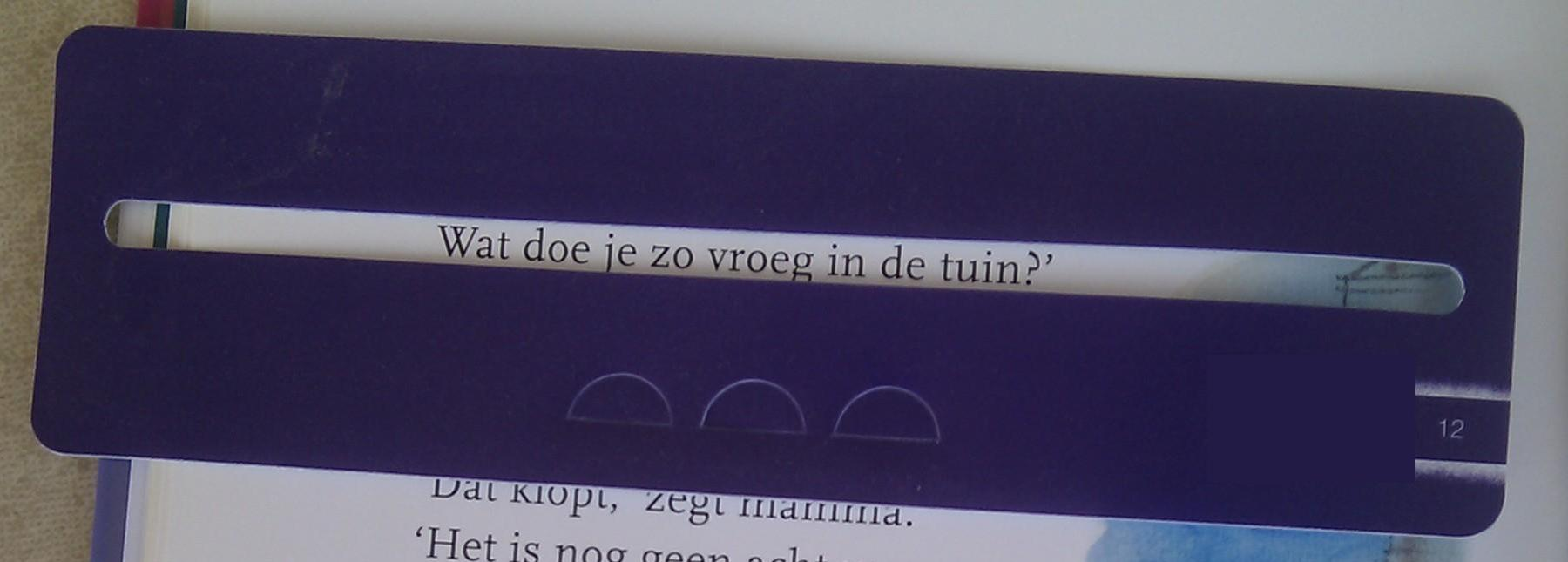 Leesvenster als hulp bij het leren lezen.